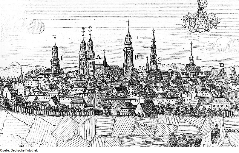 Original image description from the Deutsche Fotothek Zittau. Ausschnitt aus: Prospekt der Stadt Zittau, 1757 (Sign.: VIII 130)